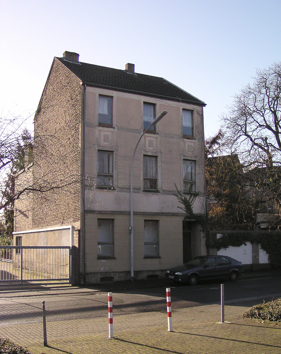 Gregor Schneiders Haus ur, Unterheydener Straße 12, Rheydt (Mönchengladbach)